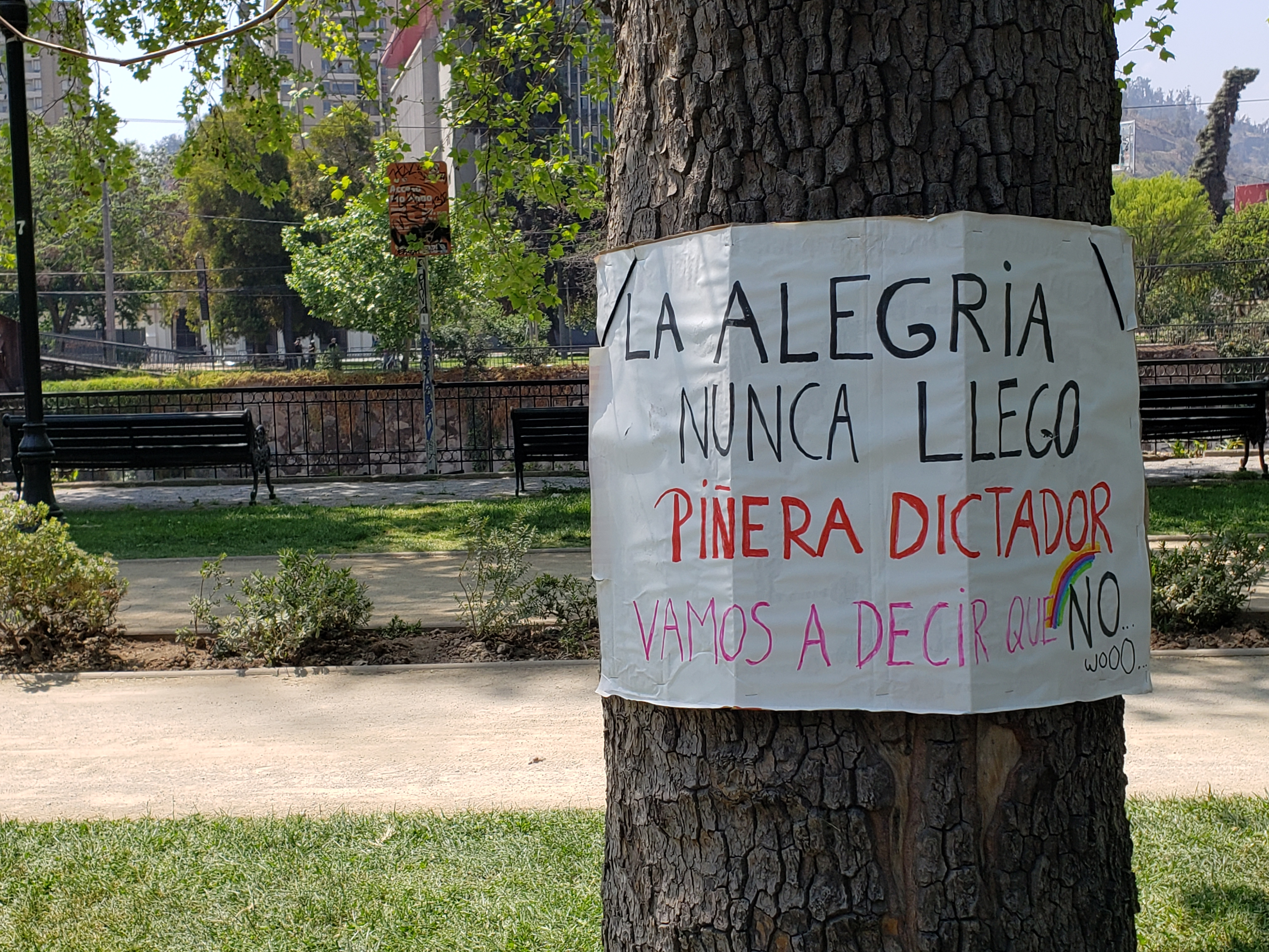 Cartel contra Sebastian Piñera en el Parque Forestal en el marco de las protestas de octubre de 2019 en Santiago de Chile